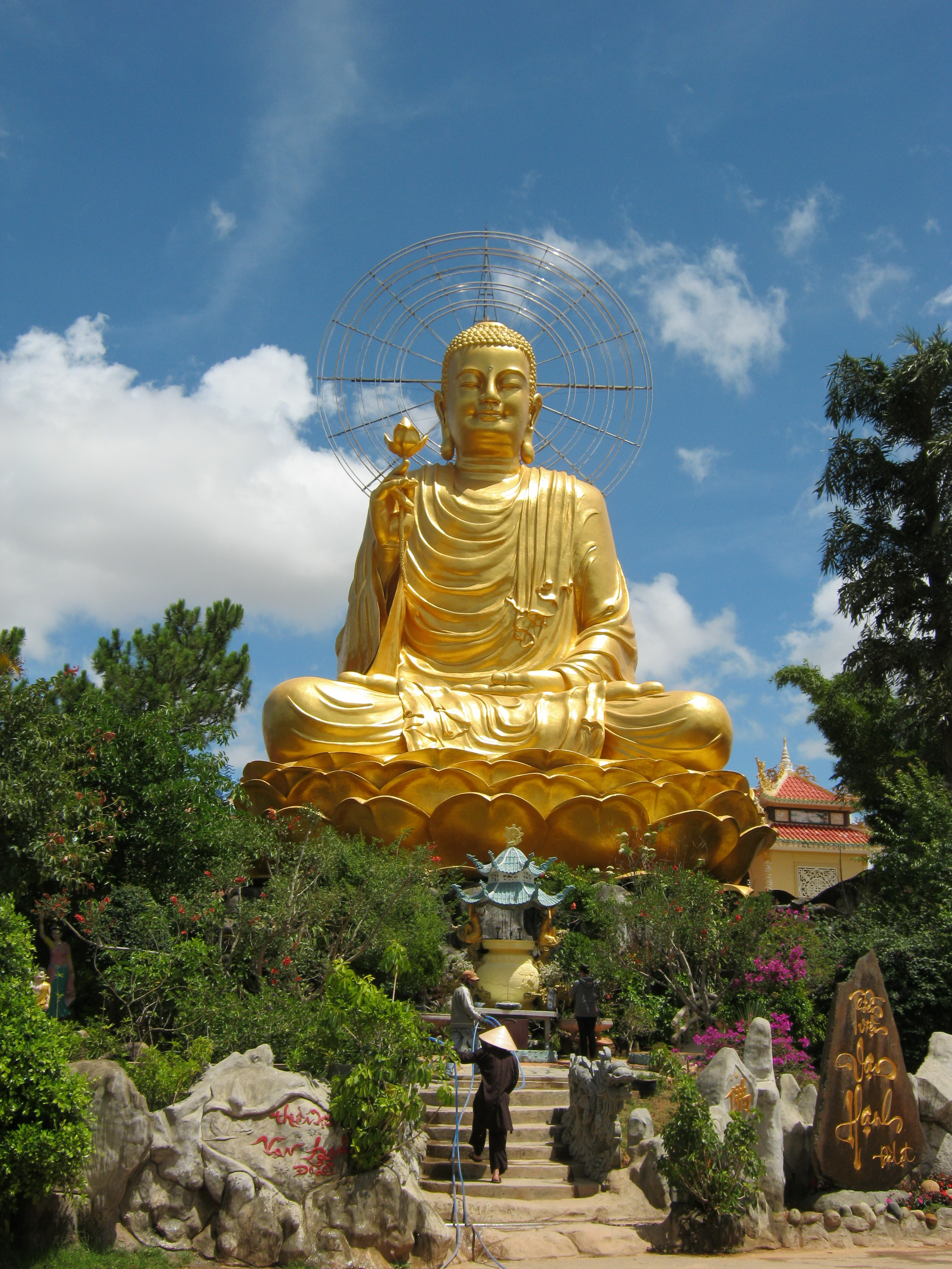 Tượng Phật Thích Ca tại Thiền viện Vạn Hạnh ở số 39 Đường Phù Đổng Thiên Vương, phường 8, thành phố Đà Lạt, Việt Nam.